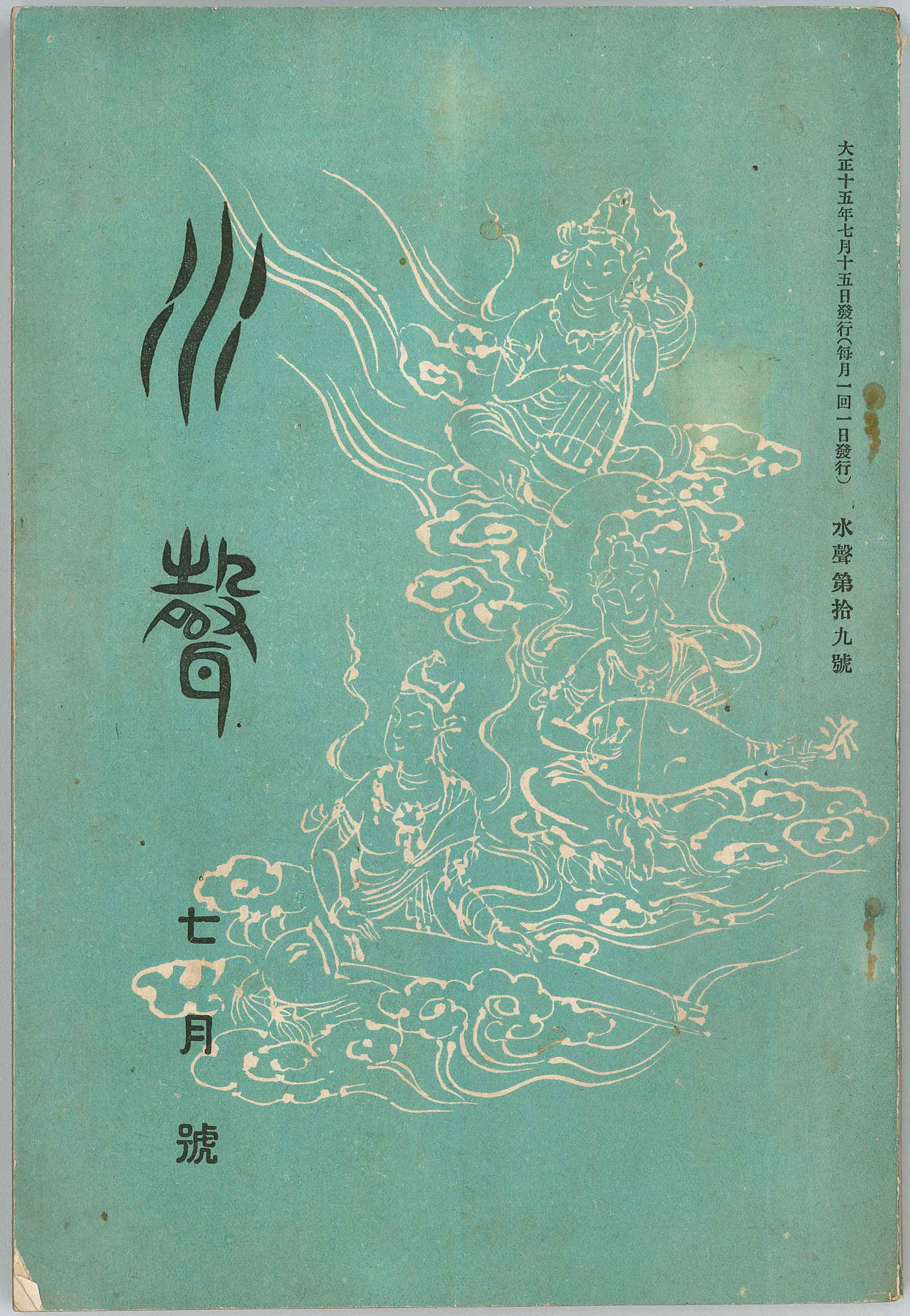 水聲 第19号(大正15年7月) 琵琶新聞社刊